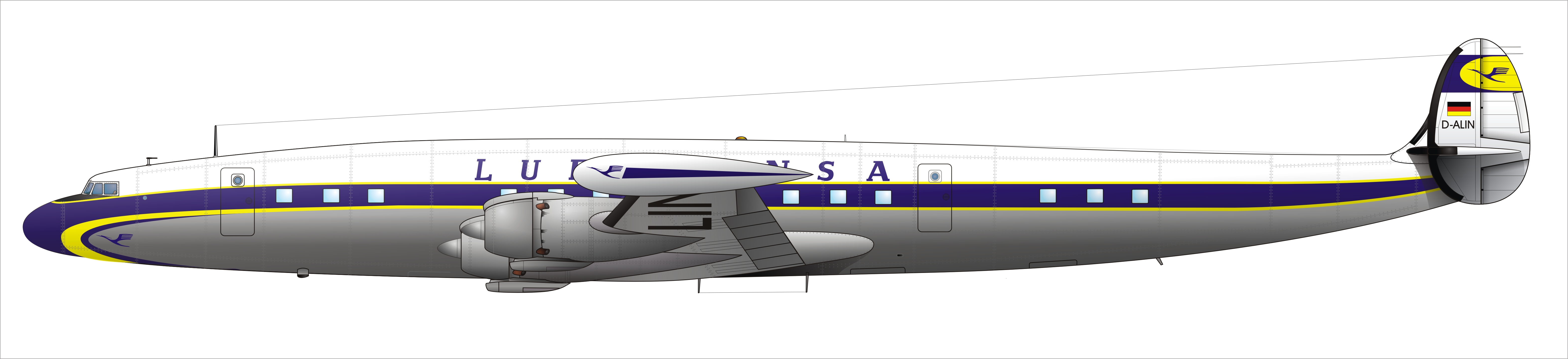 Lockheed L-1049G Super Constellation, Kennzeichen D-ALIN (s/n 1049G-4604); die Maschine brachte Bundeskanzler Konrad Adenauer zu den Verhandlungen in die Sowjetunion, die zur Entlassung der letzten deutschen Kriegsgefangenen führten. Dieses Flugzeug ist heute in der Flugausstellung L.+P.Junior in Hermeskeil, Rheinland-Pfalz, erhalten.